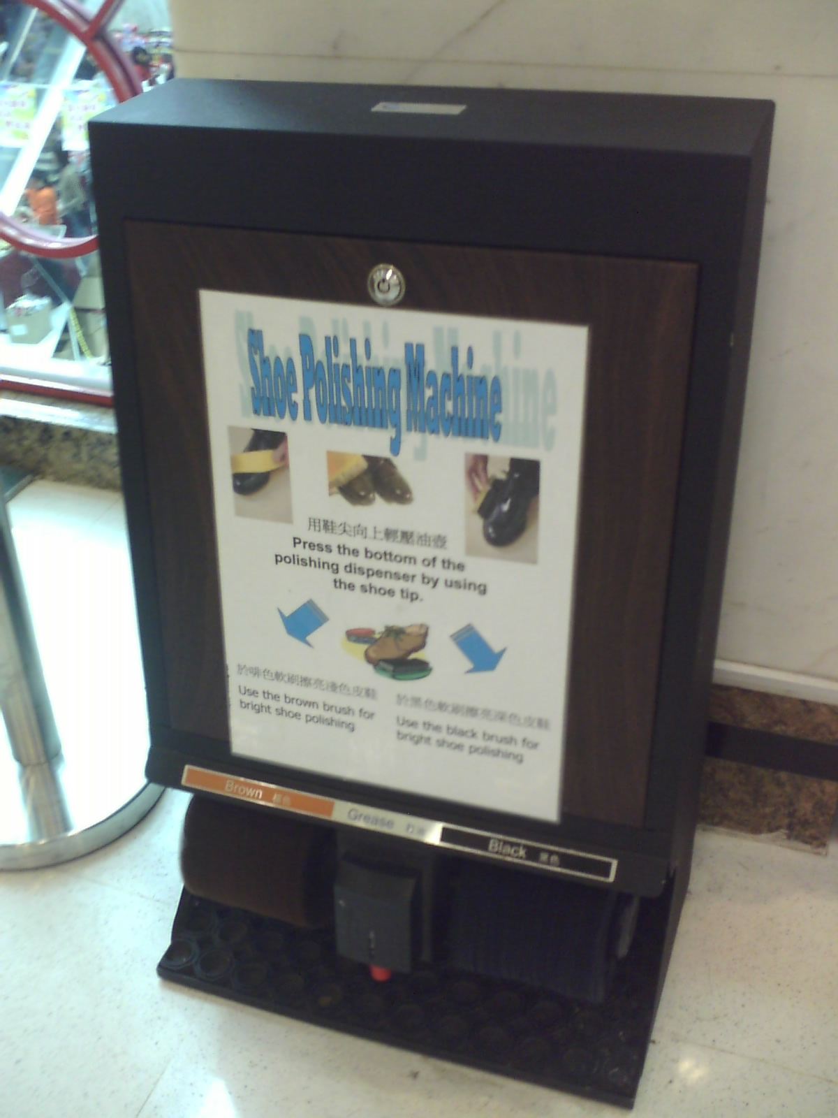 中文（台灣）: 擦鞋機